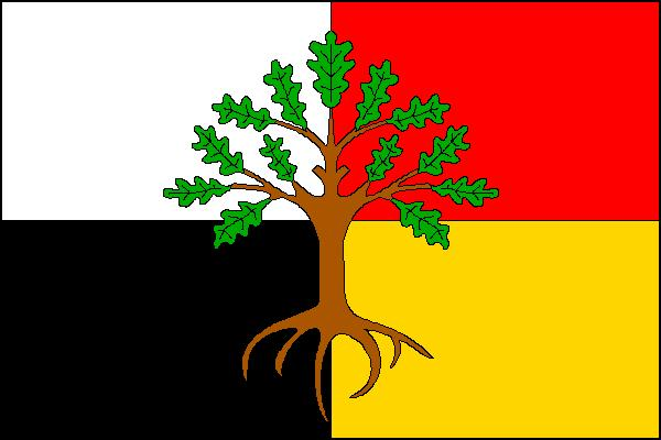 Vlajka obce Leskovec na Moravicí